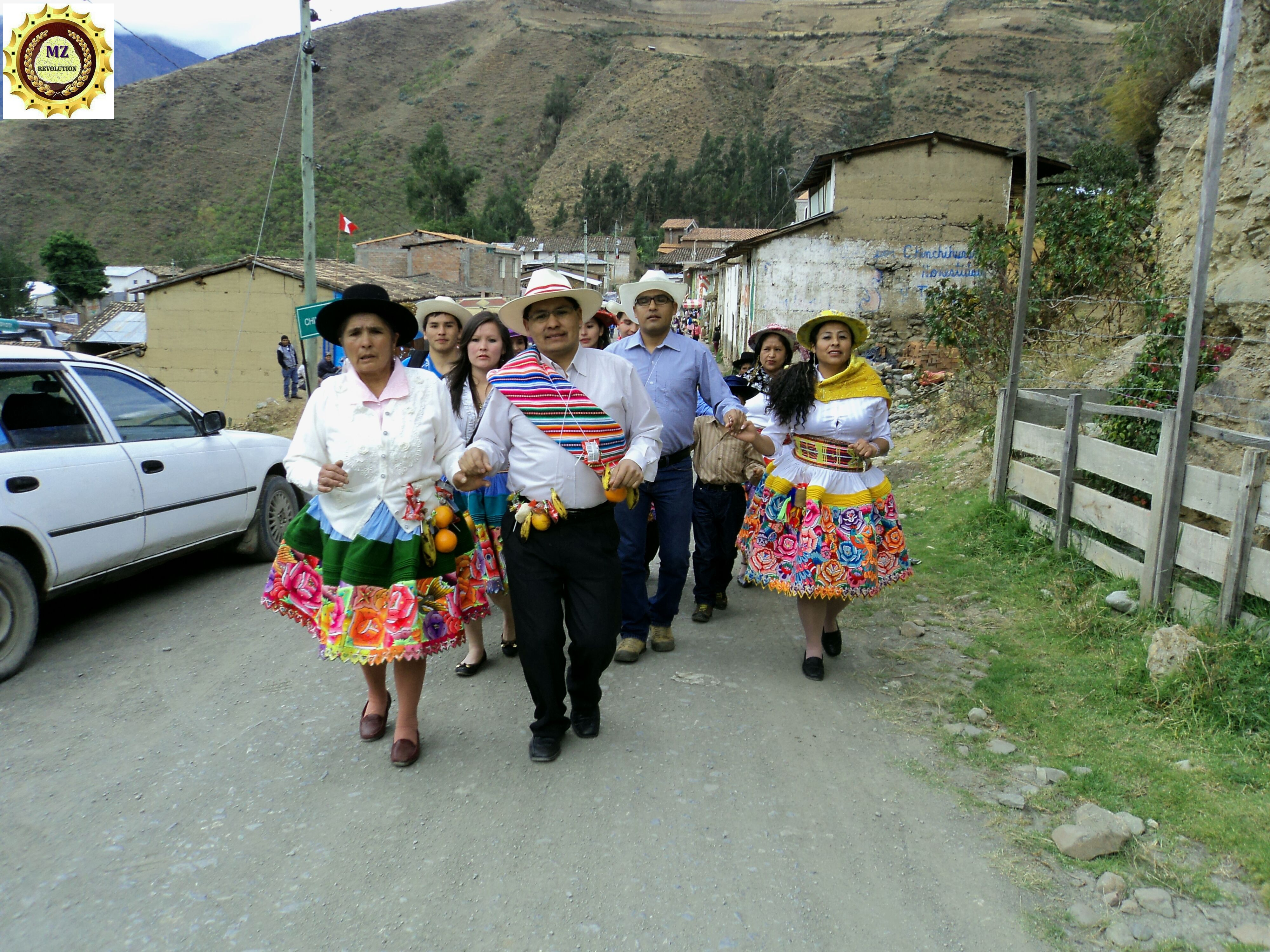 Salida de Chinchihuasi